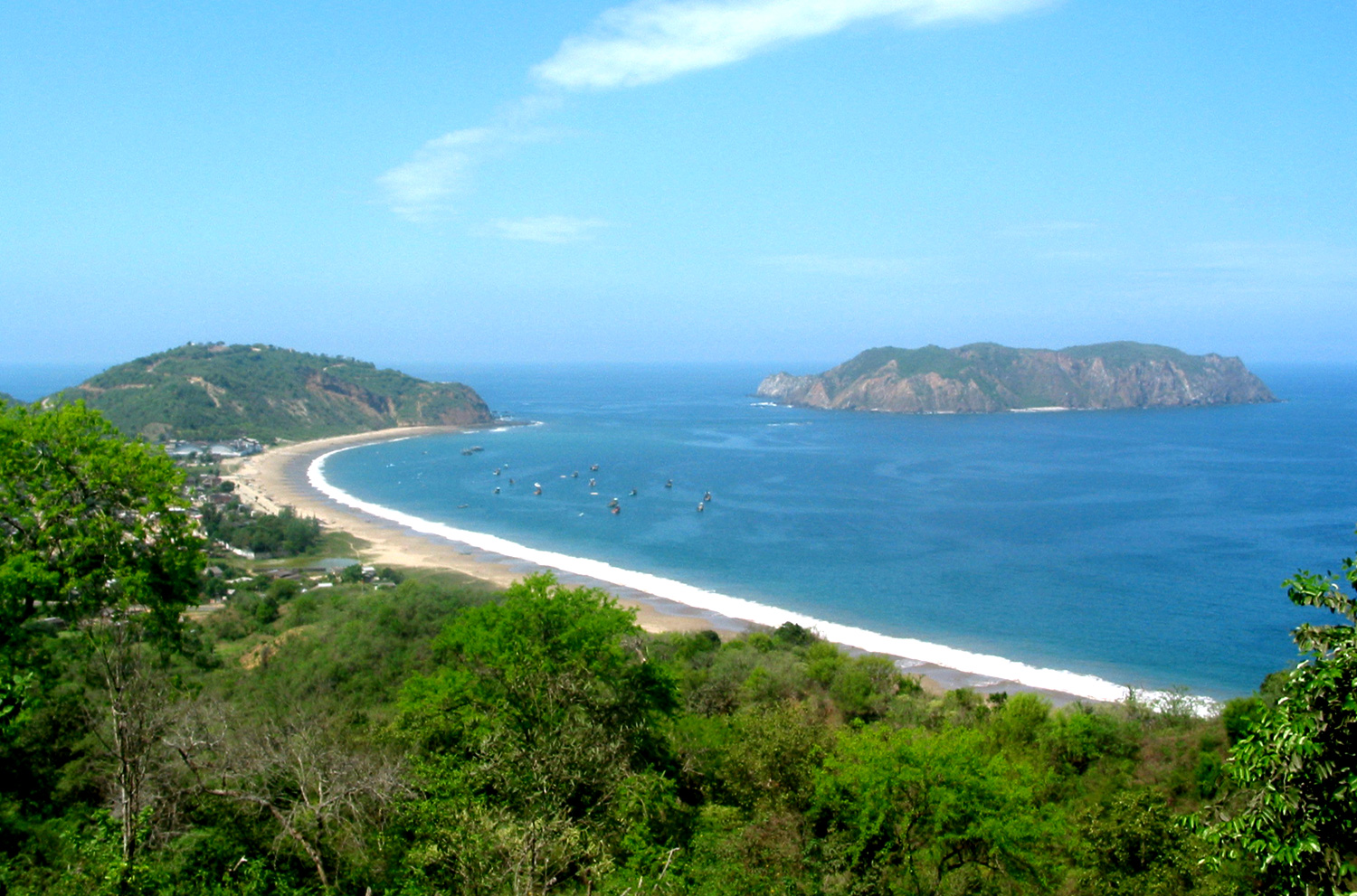 Salango (Comuna Salango)pueblo de profundas y verdaderas raíces ancestrales con aproximadamente 5000 años de Historia y Cultura. Salango se encuentra asentada a orillas del pacífico sur de Manabí, en la zona de amortiguamiento del Parque Nacional Machalilla. La comuna Salango esta compuesta por el sitio Salango que a la vez es la cabecera parroquial, y por el recinto Río Chico. Localización y dimensiones Altura: 0 - 108 m.s.n.m Coordenadas: 01º 15’ S, 80º 50’ 30’’ O Superficie: 2.536 Ha. Provincia: Manabí Capital: Portoviejo Cantón: Puerto López Población: 3.800. Ubicación: NORTE: Puerto López - SUR: Santa Elena - ESTE: Guayas - OESTE: Océano Pacífico. Sector: 641 Km al suroeste de la ciudad de Quito. 251 Km al noreste de la ciudad de Guayaquil. POBLACION COMUNAL. La población actual aproximada de la Comuna Salango es de 3.800 habitantes, organizada alrededor de barios: Barrio Los Ciruelos Barrio María Auxiliadora Barrio Las Orquídeas Barrio Las Mercedes Barrio Los Jardines Barrio 21 de Noviembre Barrio 25 de Diciembre Barrio Brisas del Mar Barrio Martha de Roldós